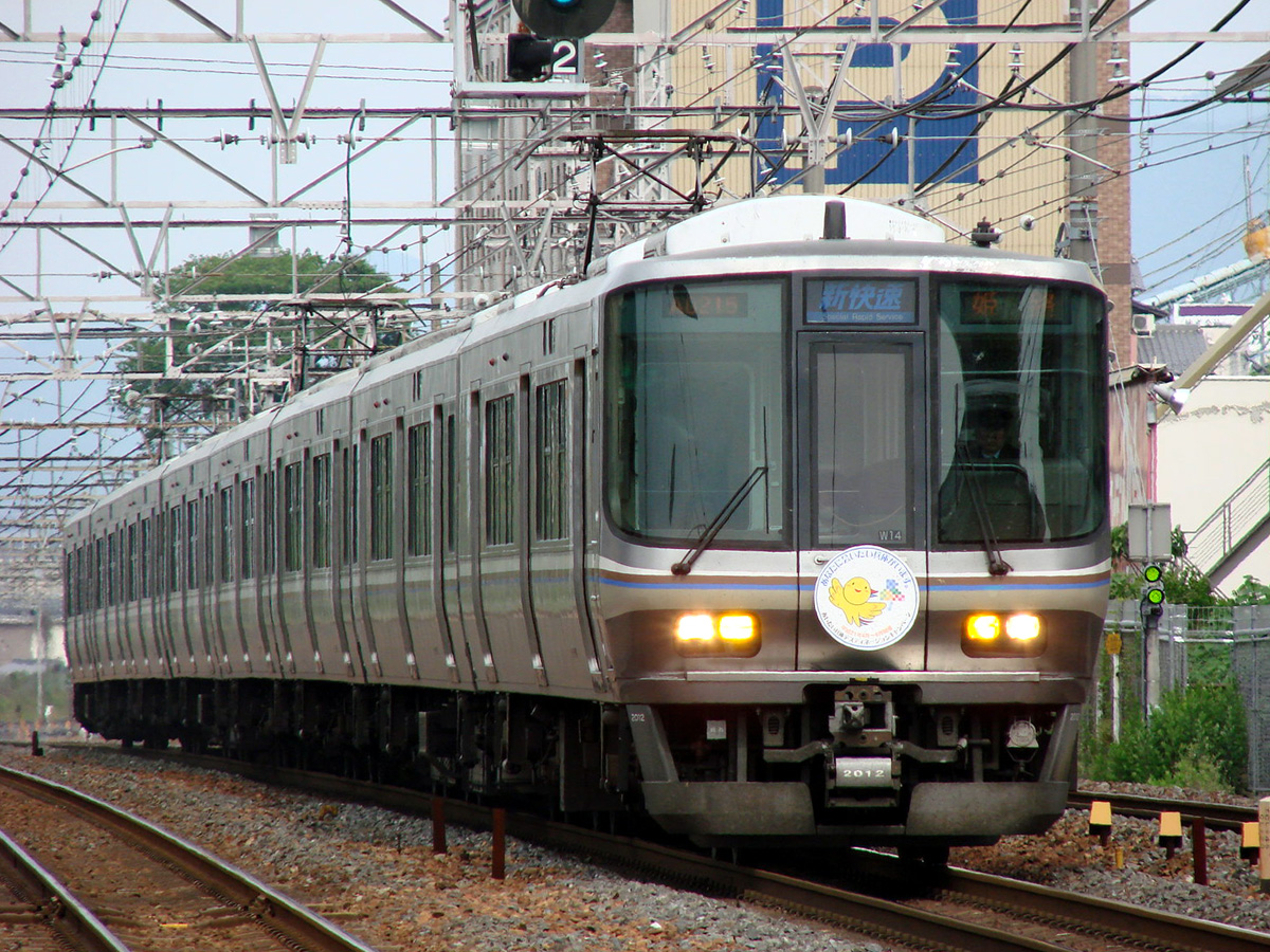 JR西日本 223系2000番台（大津）